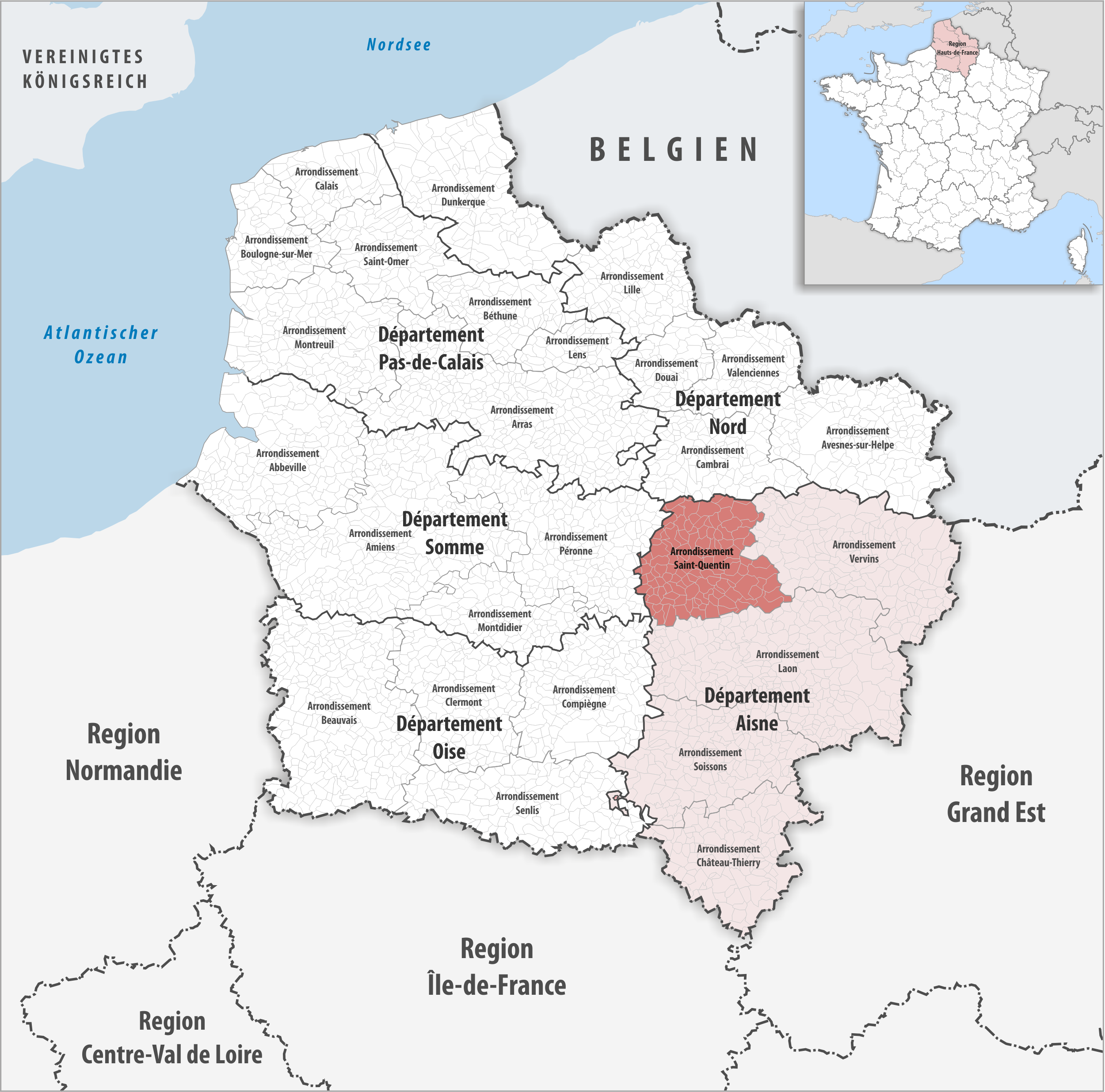 Lage des Arrondissements Saint-Quentin